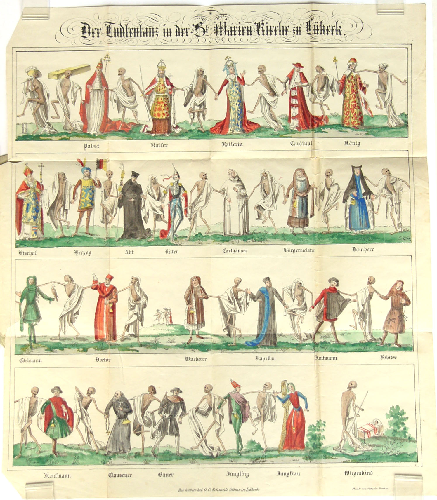 Kolorierte Federlithographie aus "Ausführliche Beschreibung und Abbildung des Todtentanzes in der St. Marien-Kirche zu Lübeck", Lübeck 1842. Die Zeichnung nach der Kopie von 1701 von Anton Wortmann.